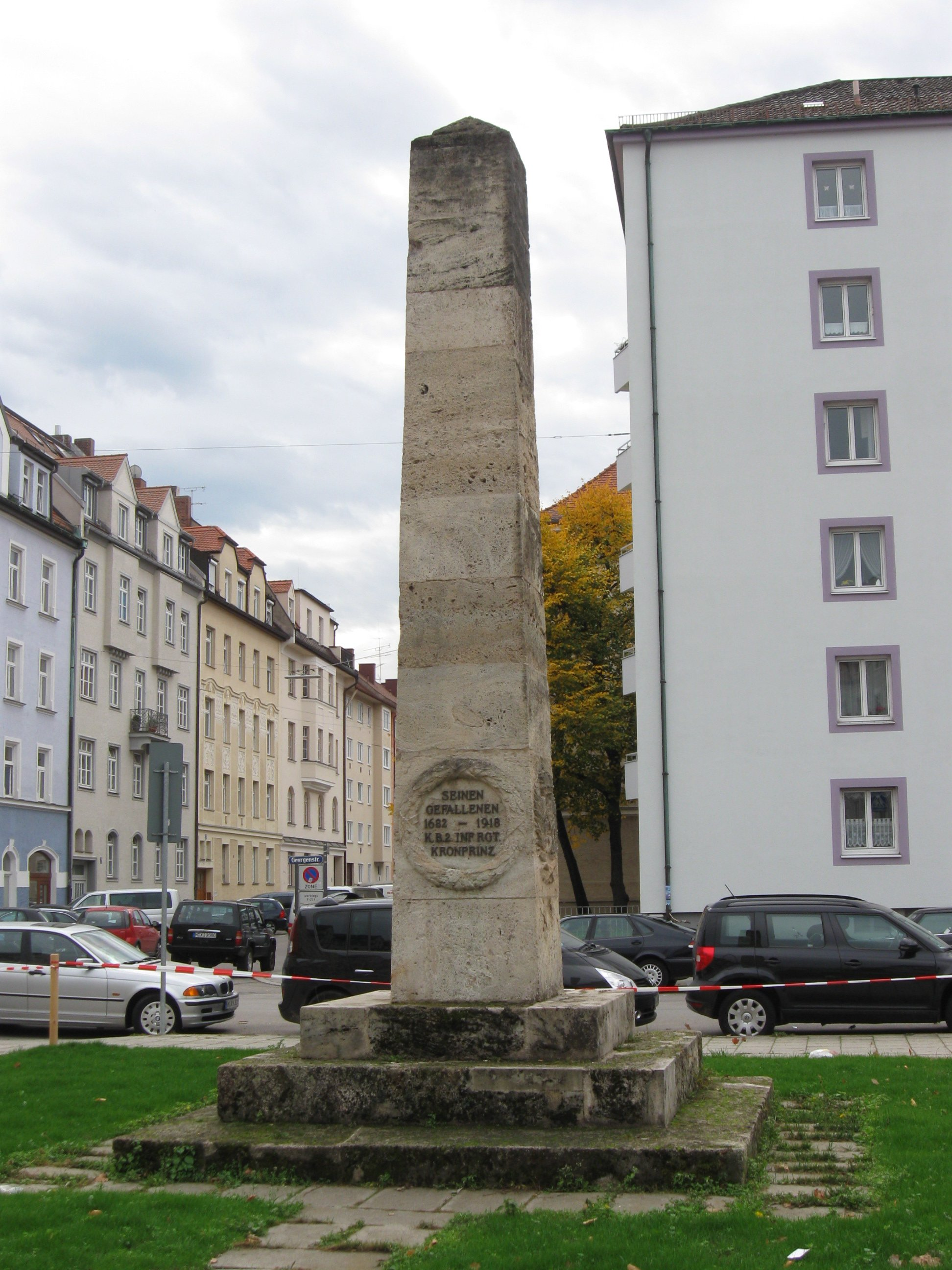 Lothstraße; Obelisk, Kriegerdenkmal des 2. Bayerischen Infanterie-Regiments, Obelisk aus Muschelkalkquadern, von Hermann Broxner, 1923; auf kleinem dreieckigem Platz am Nordende der Straße, Ecke Winzererstraße.